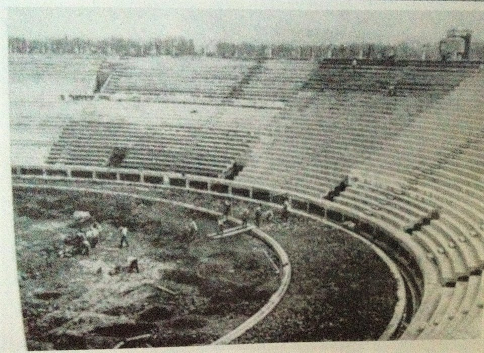 Napoli - Stadio Ascarelli in costruzione, anni '30. Autore sconosciuto.